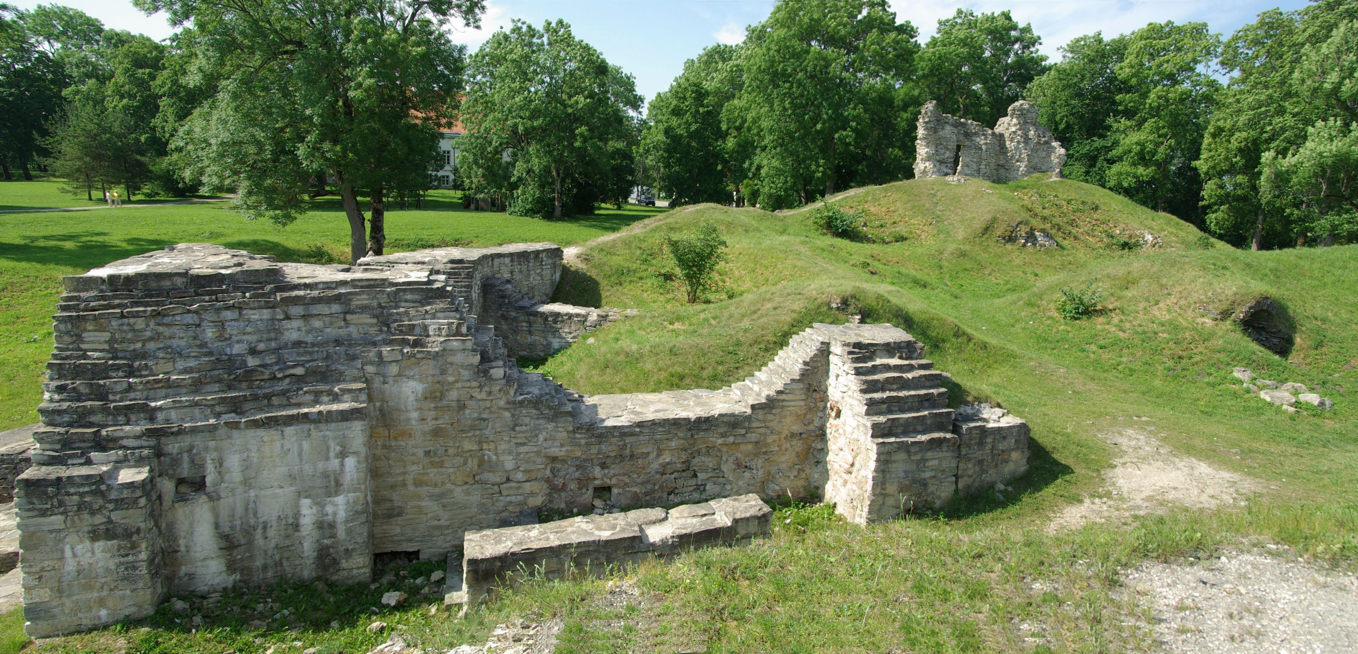 Lääne maakond, Lihula vald, Lihula linn